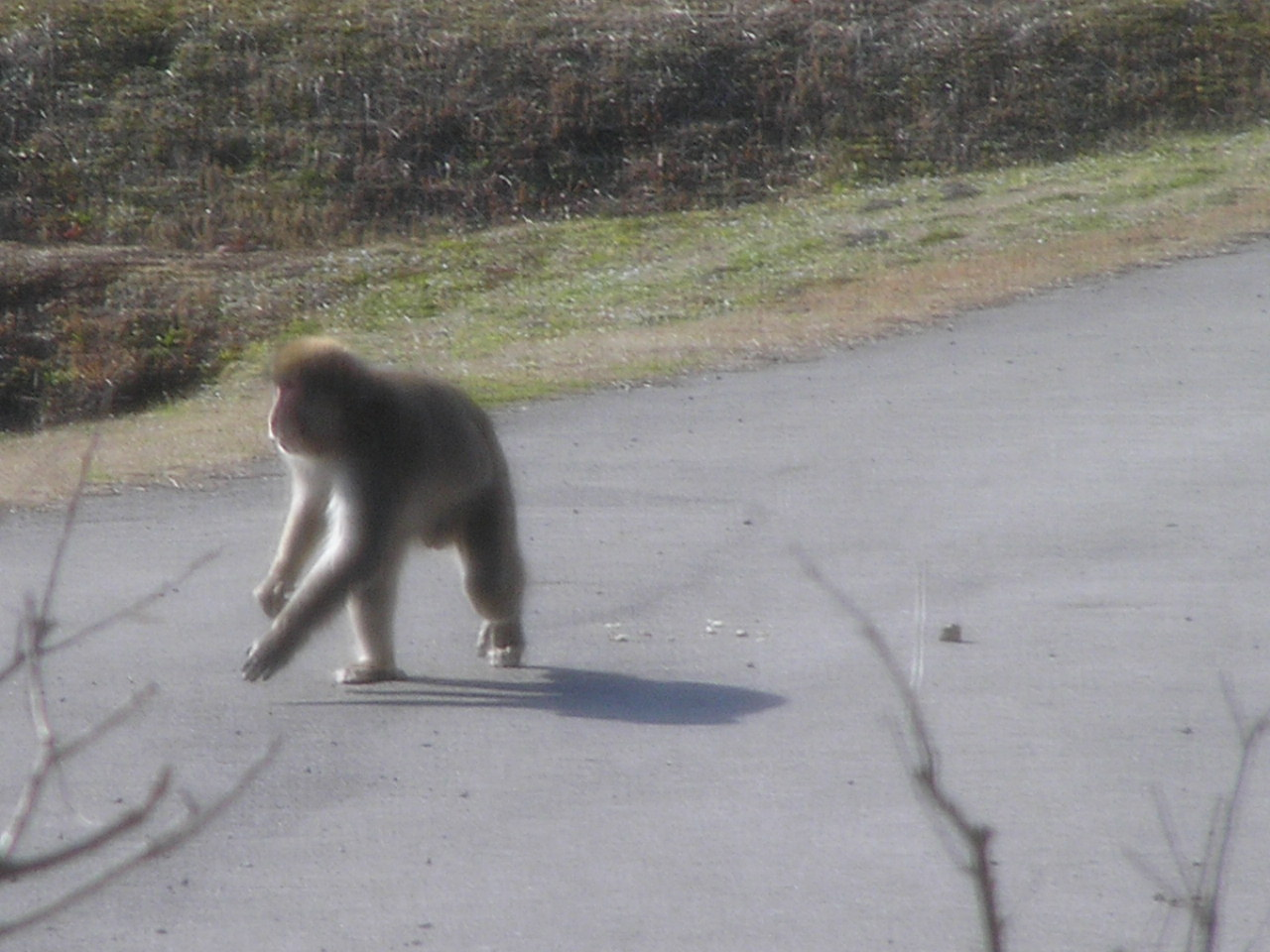 篠山の野生サル ～photo by 松岡明芳